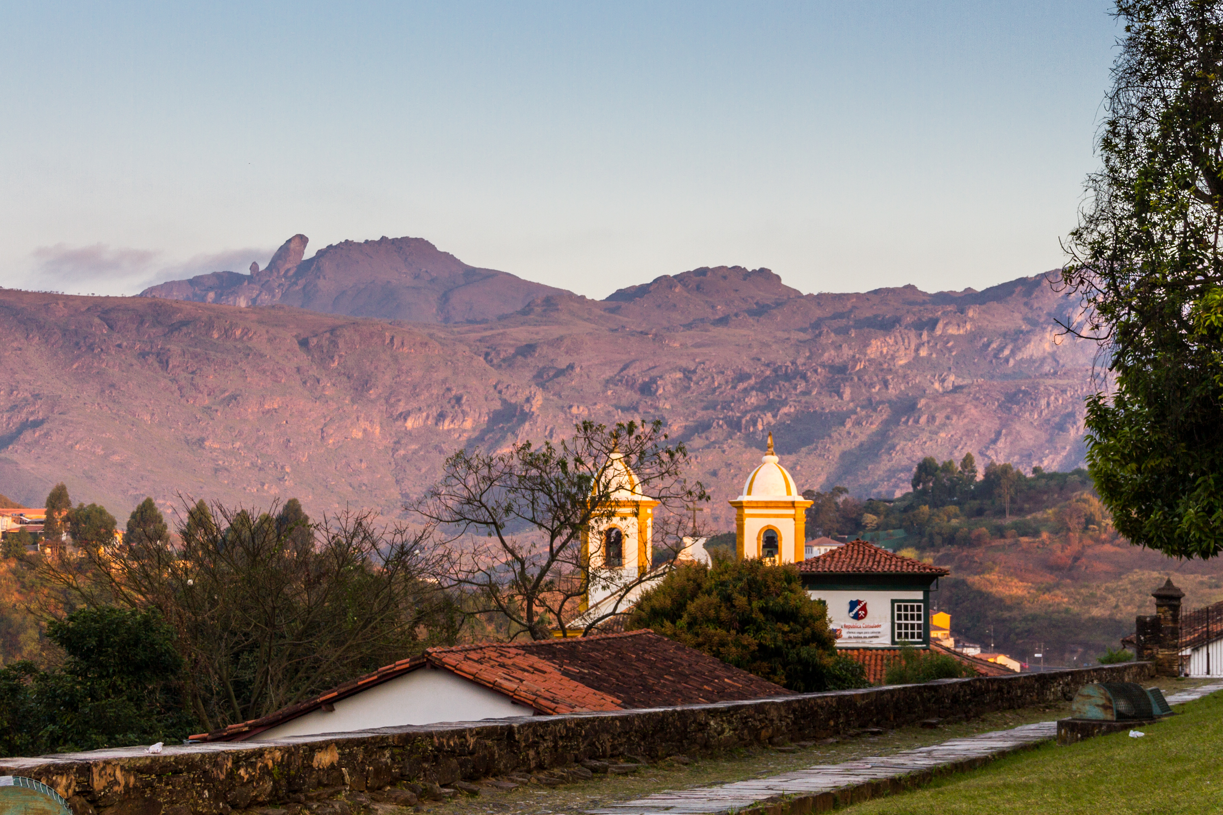 Vista a partir da lateral da Igreja de S. Francisco de Assis em Ouro Preto.